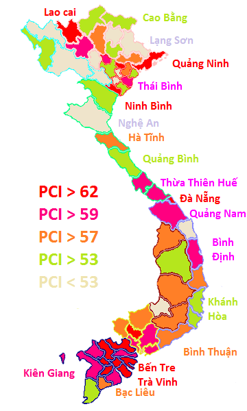 Bản đồ chỉ số năng lực cạnh tranh cấp tỉnh, sửa theo bản đồ có sẵn trên wiki